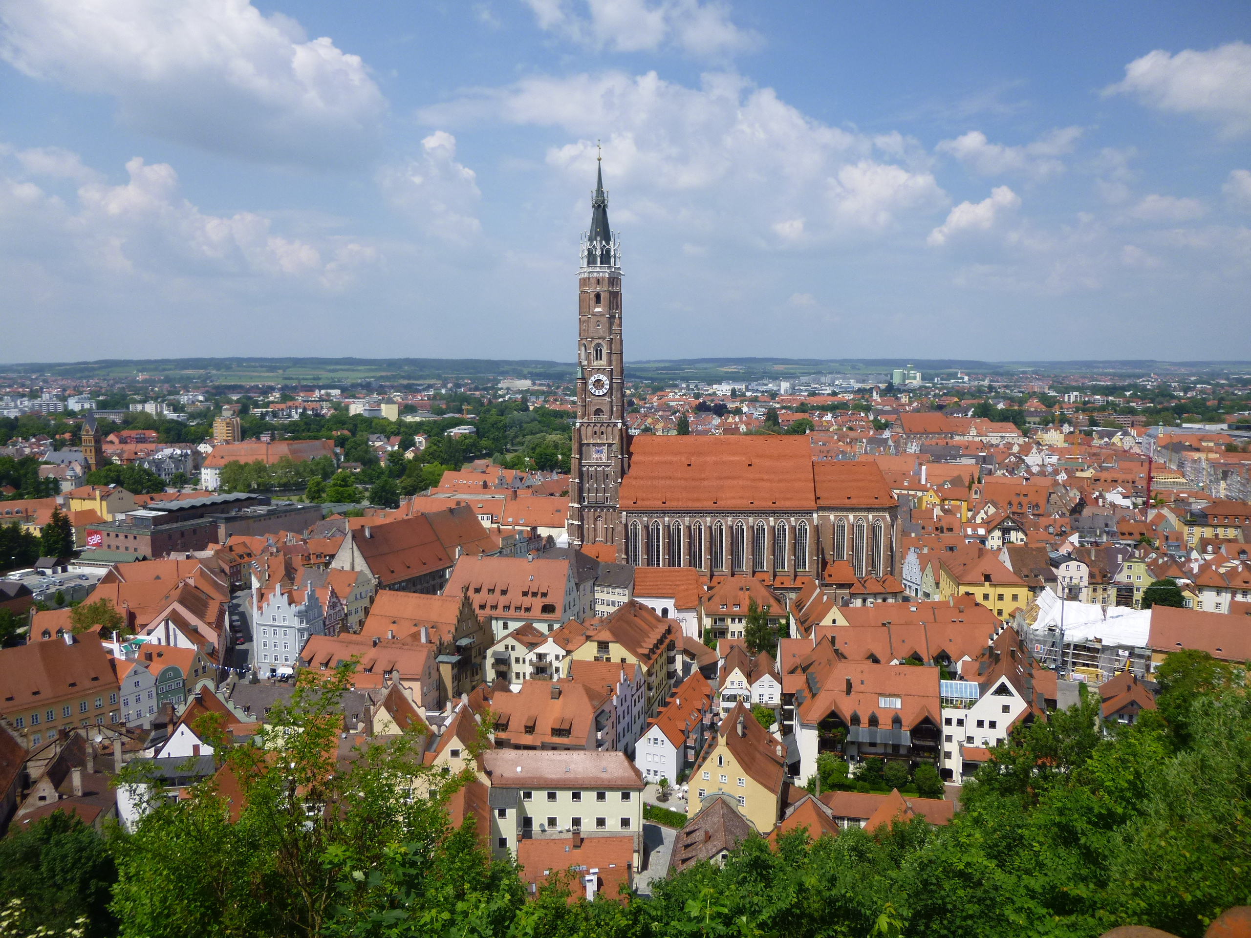 Blick von der Burg Trausnitz auf die Altstadt von Landshut mit der Kath. Pfarrkirche St. Martin.This is a photograph of an architectural monument.